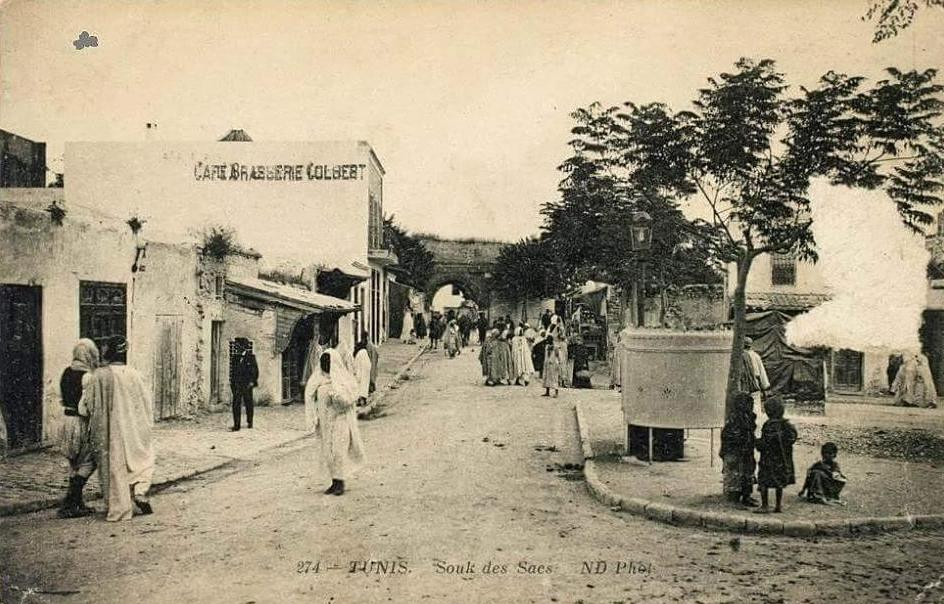 Bab Menara, la médina de Tunis باب منارة, مدينة تونس العتيقة